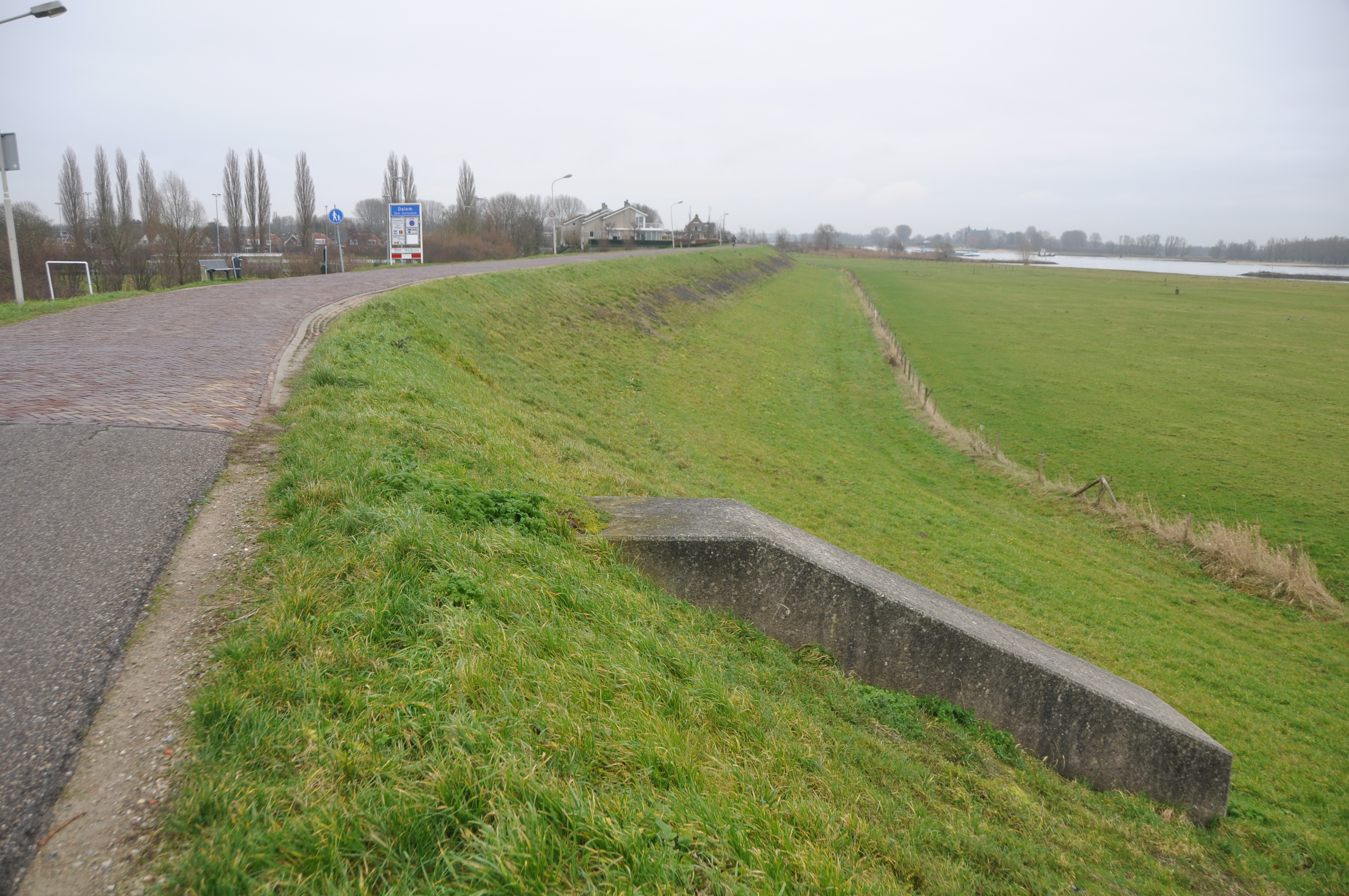 De Waaldijk bij Dalem, bestraat daar waar de dijk kan worden opgeblazen om het water uit de Tielerwaar te laten lopen.